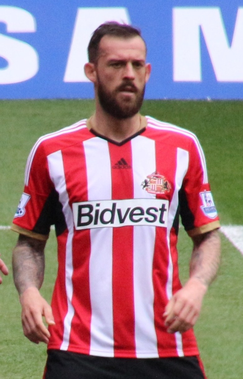 Le footballeur écossais Steven Fletcher avec Sunderland en mai 2015.